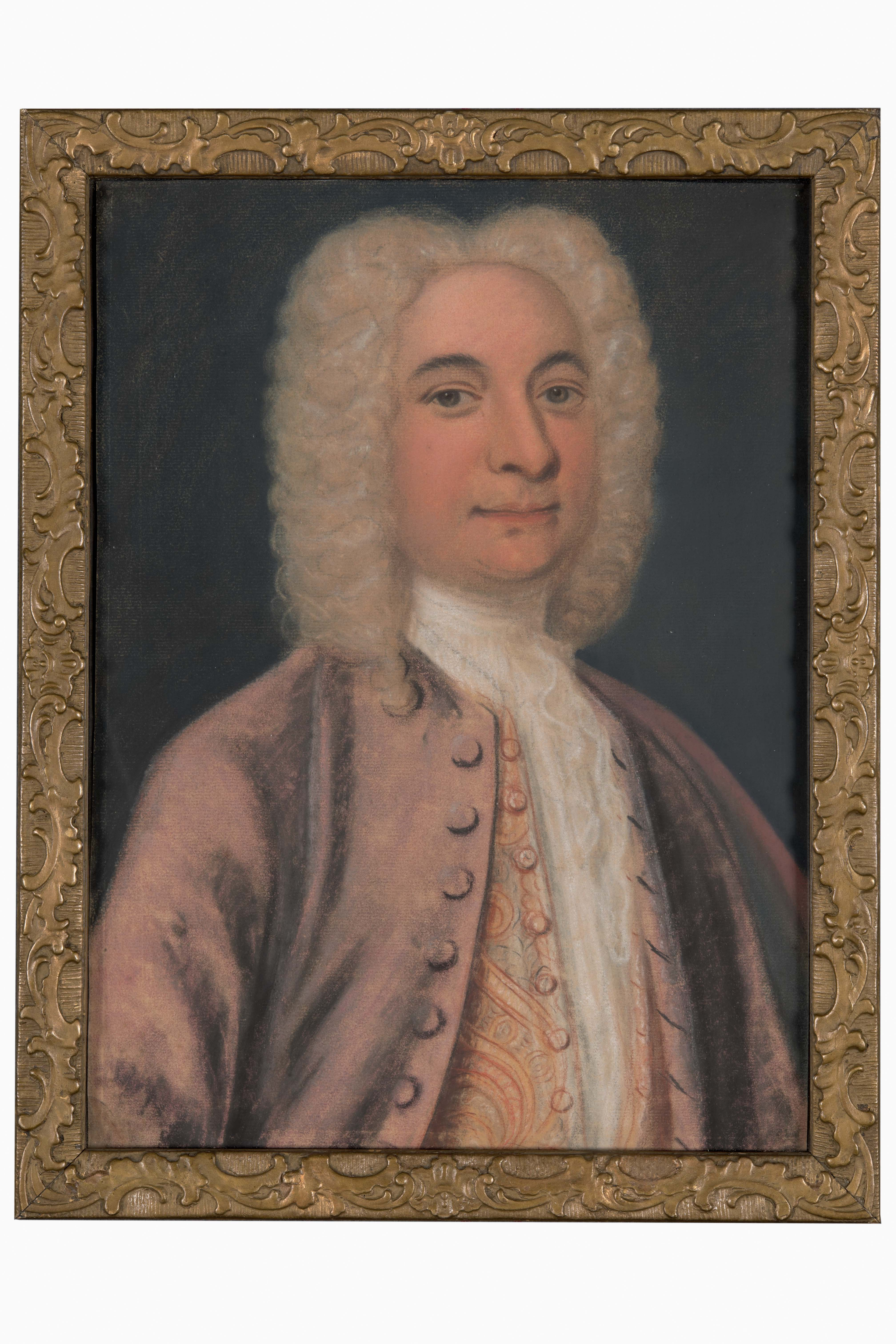 Pastel voorstellende portret van een man: Frederic Graaf de Thoms. Het is een borstbeeld, een weinig naar rechts gewend, de beschouwer aankijkend. Hij draagt een korte grijze krulpruik, waarvan de rechterhelft over de schouder naar voren valt, voorts een lila rok, een goud geborduurd vest en een witte kanten das. Niet gesigneerd. De pastel is ingelijst achter glas in een rechthoekige vergulde lijst met een decoratie van acanthusblad op de rand.